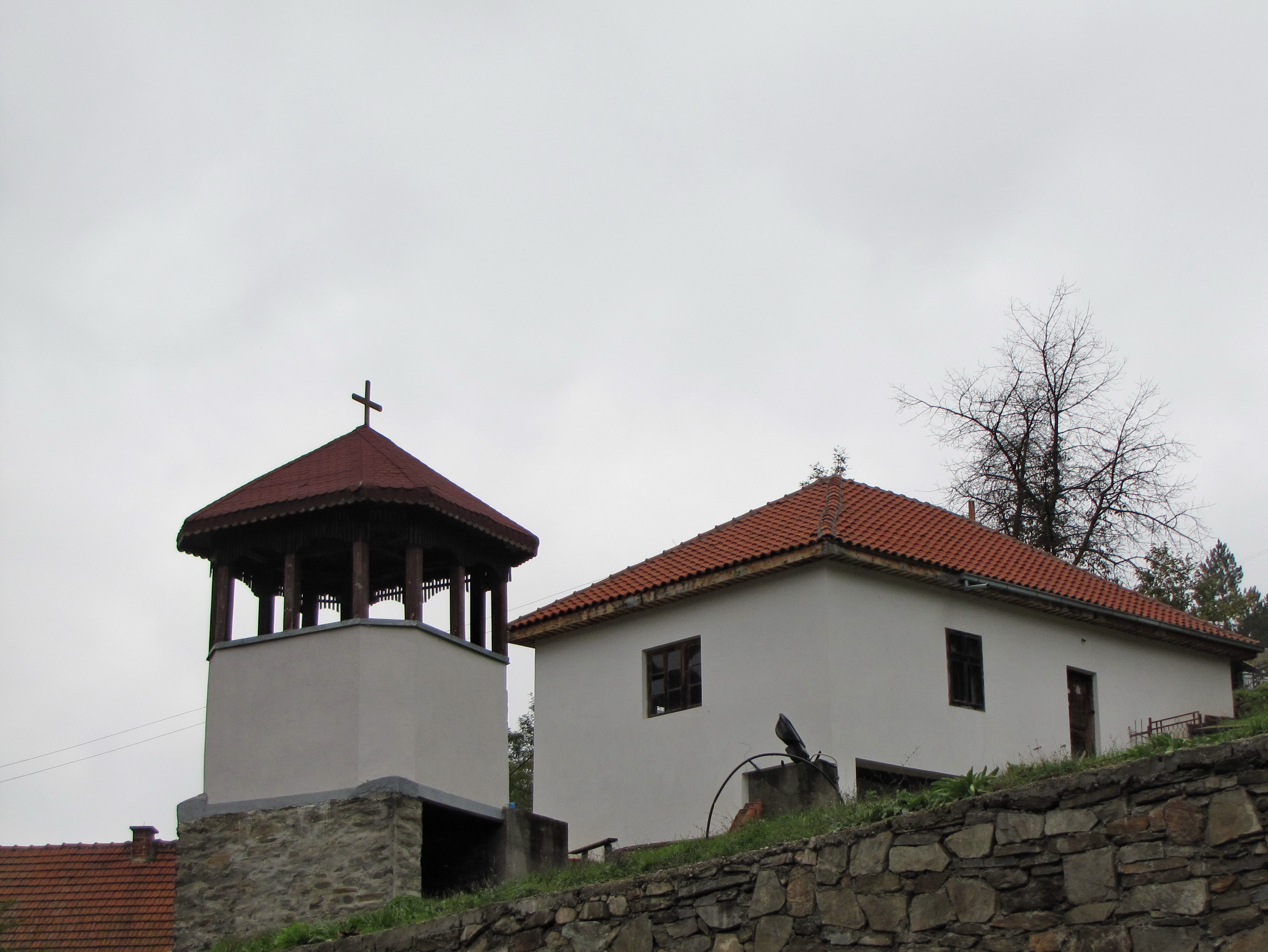 Село Доња Љубата (Босилеград).